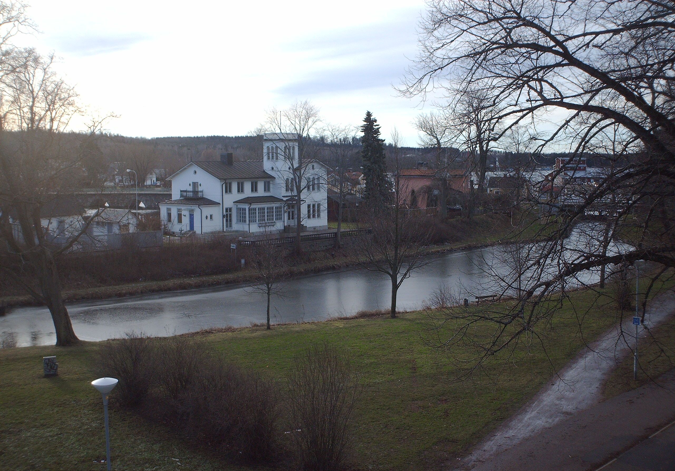 Villa Toss, Kvarnön, Motala, Sweden.